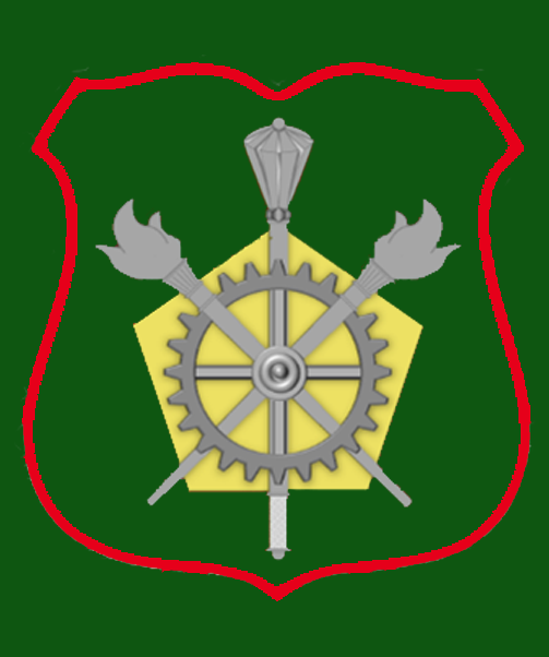 Нарукавный знак УВП МО РФ